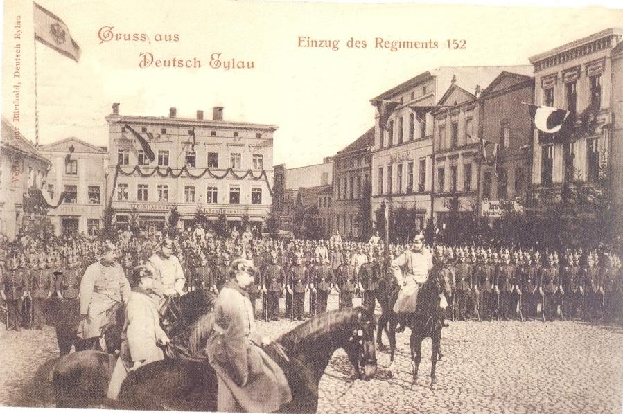 Wkroczenie 152. regimentu na rynek Starego Miasta w Iławie podczas przemarszu do koszar.